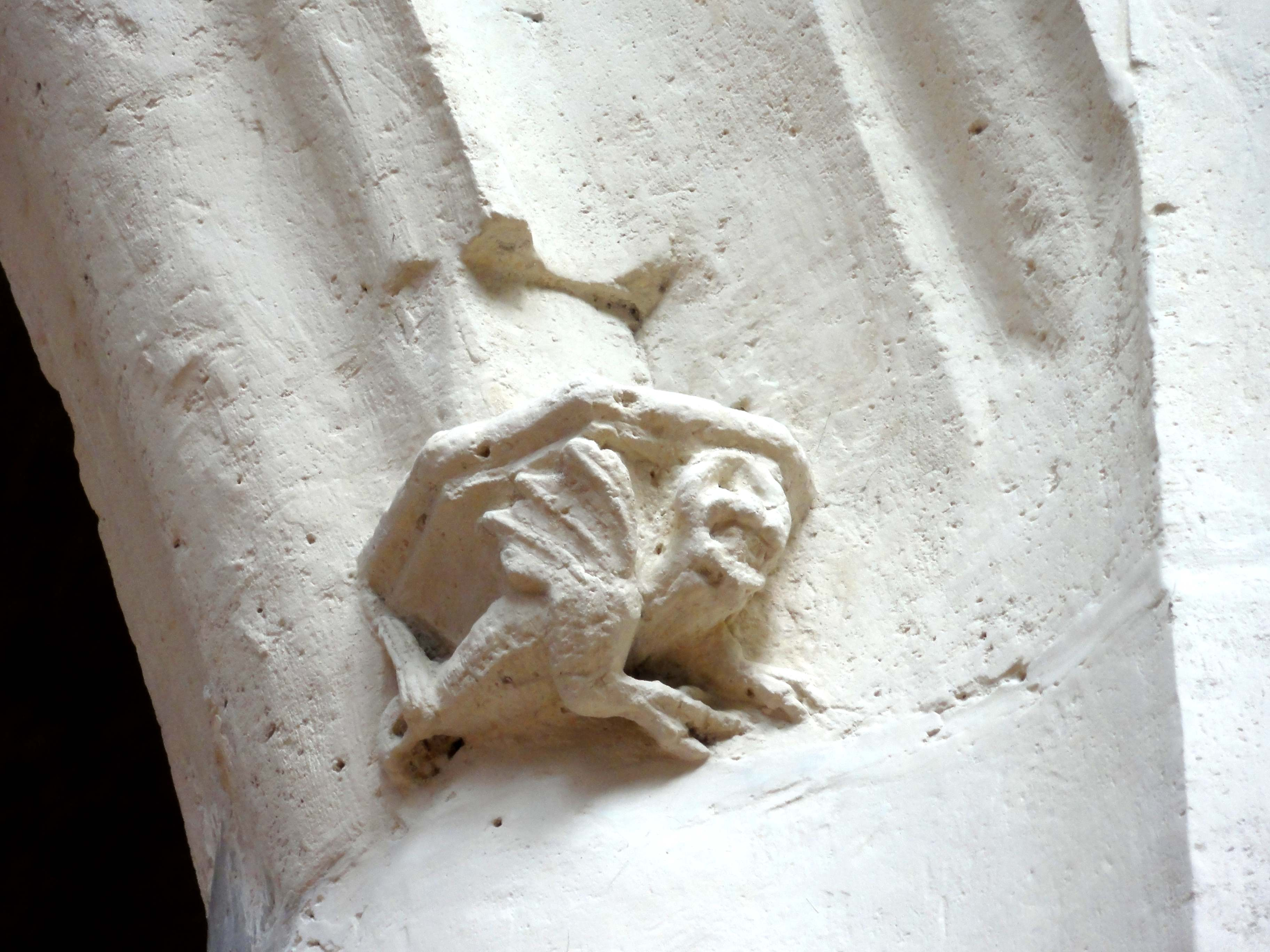 Voir titre.